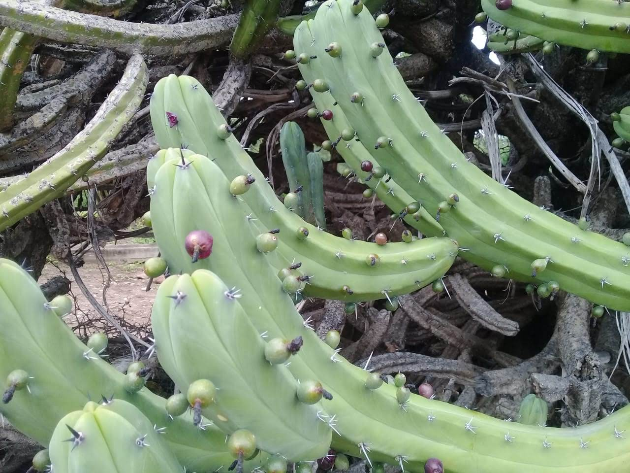 Garambullo, cactácea